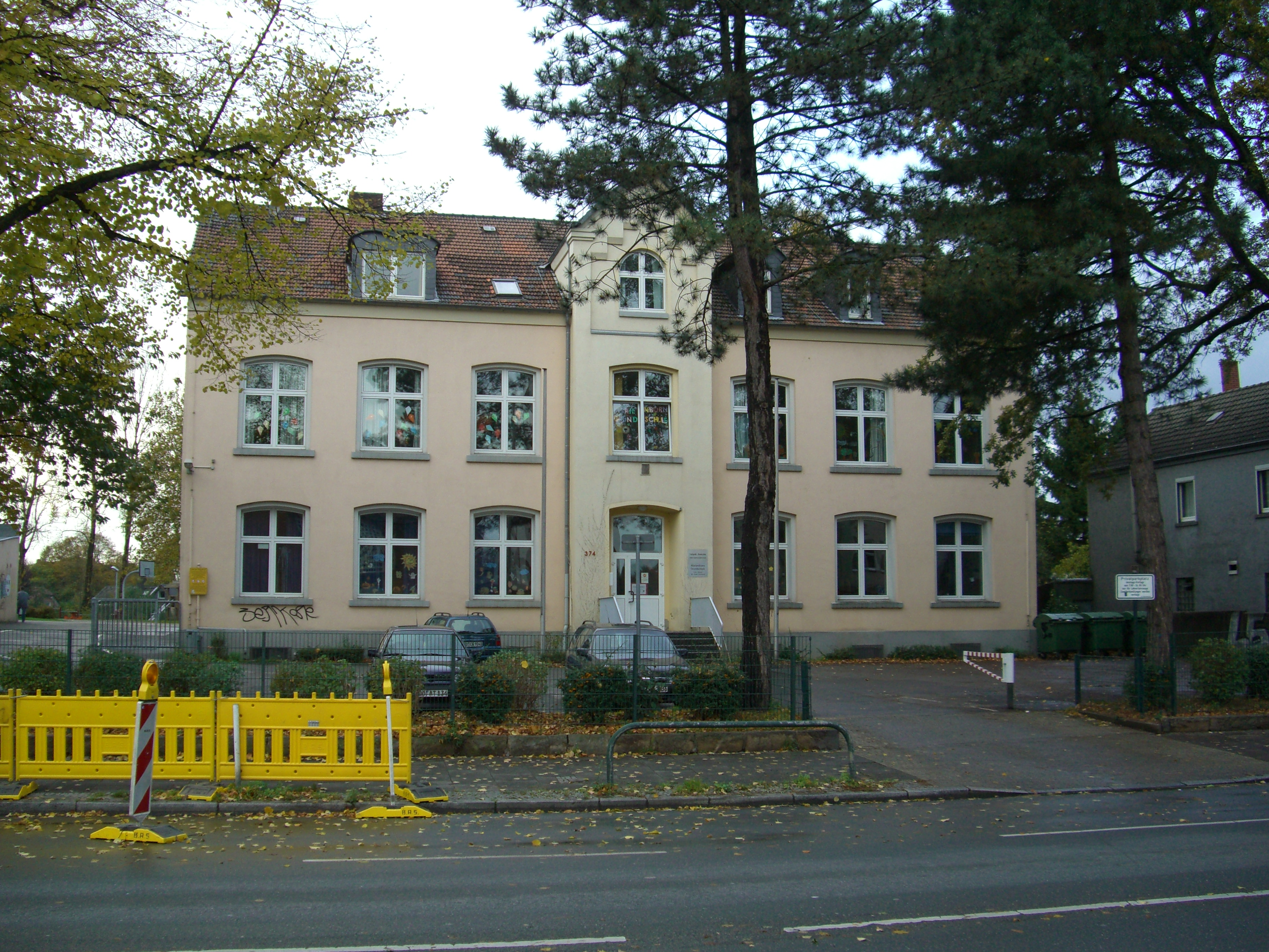 Dortmund-Bövinghausen, Freiligrath Elementary School